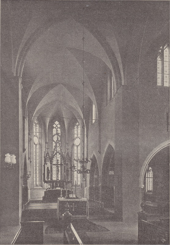 Blick in den Chor der St.-Martini-Kirche Halberstadt mit neugotischem Hochaltar (geschaffen von Hofbildhauer Gustav Kuntzsch, Wernigerode)